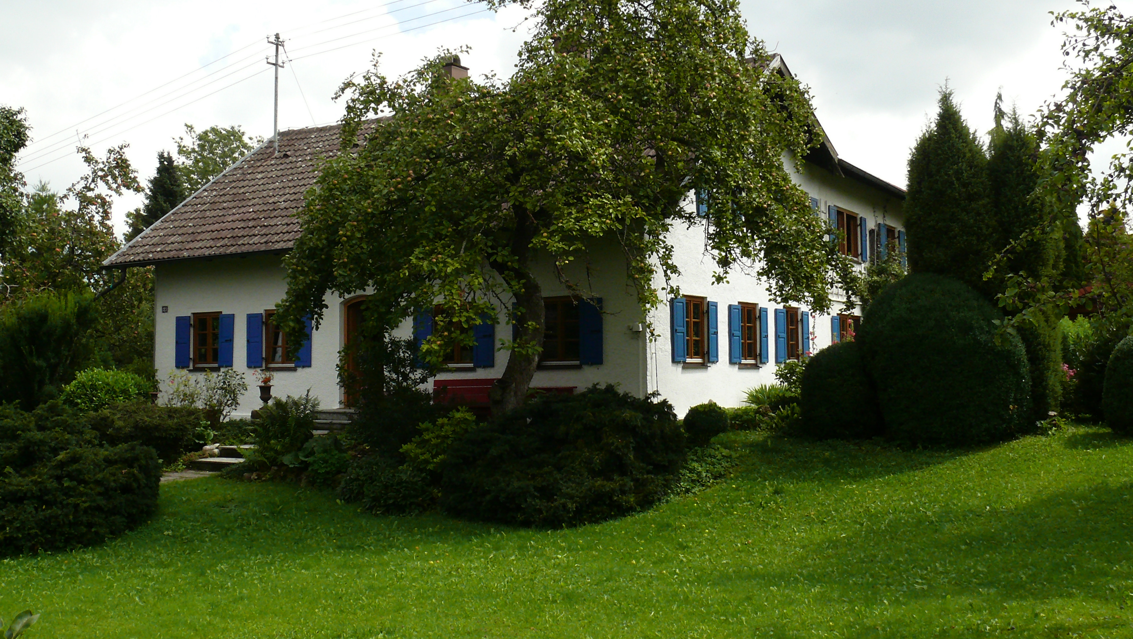 Heimathaus des Kinderbuchautors Josef Guggenmos in Irsee / Ostallgäu